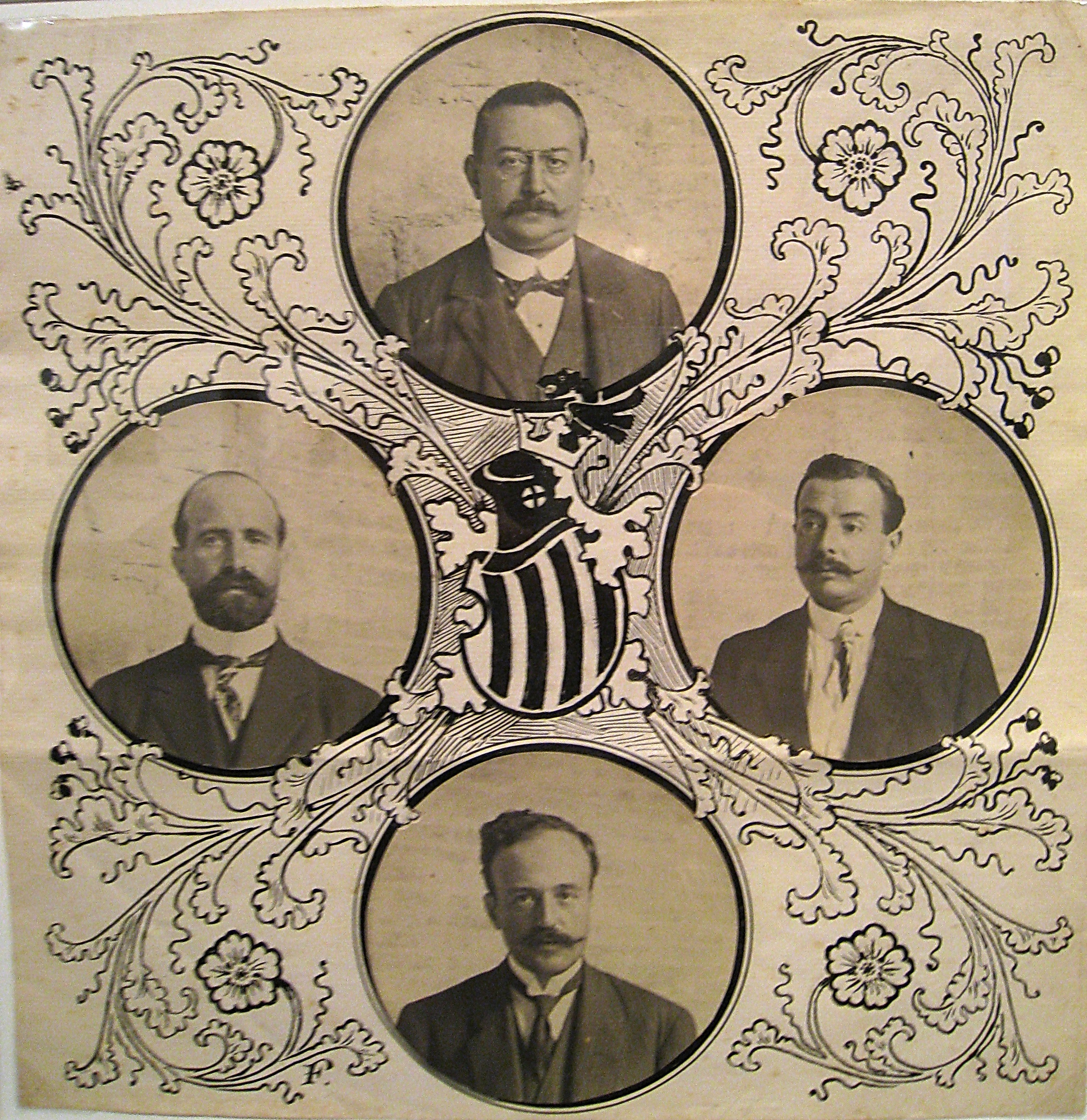 Els presidents de les Diputacions catalanes, que van formar la ponència que va redactar les bases de la Mancomunitat